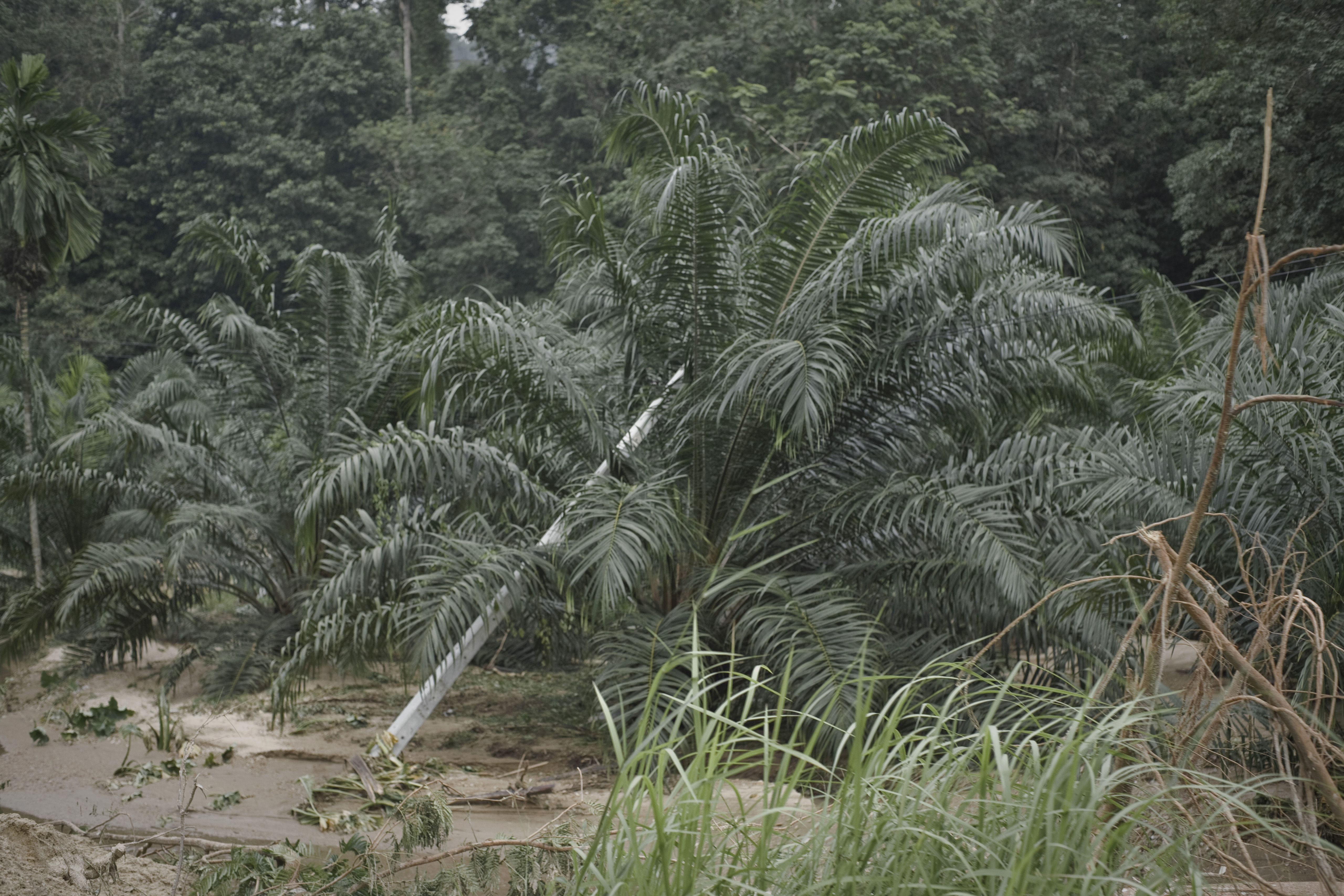 นายกรัฐมนตรีตรวจเยี่ยมพื้นที่ดินถล่ม ณ บ้านคลองเหลง ตำบลควนทอง อำเภอขนอม จังหวัดนครศรีธรรมราช วันอาทิตย์ ที่ 7 พฤศจิกายน พ.ศ.2553 (Photographer attached to the Prime Minister of the Kingdom of Thailand : Peerapat Wimolrungkarat / พีรพัฒน์ วิมลรังครัตน์) @is50mm